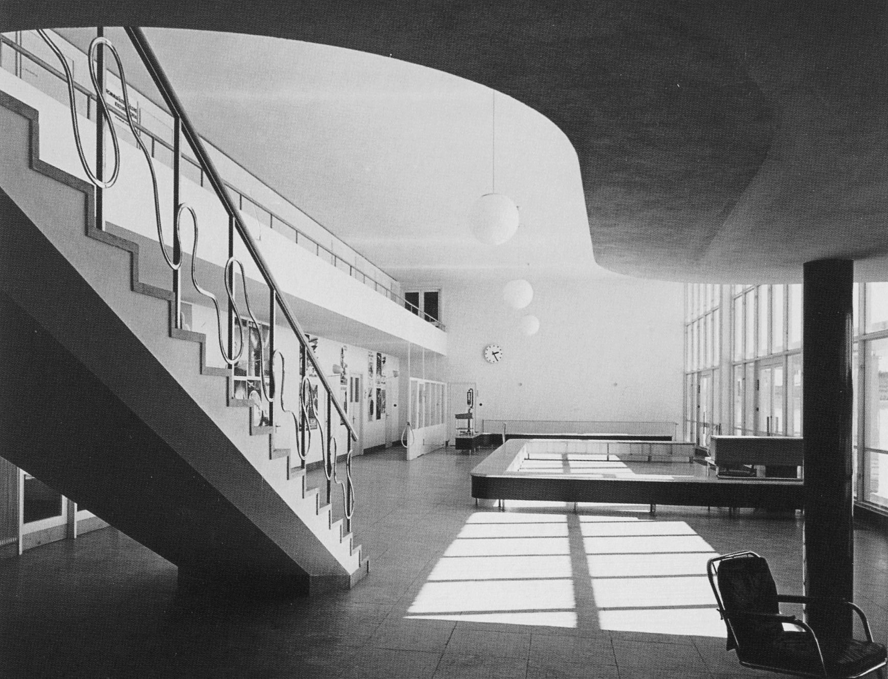 Bromma flygplats, stationsbyggnaden, interiör